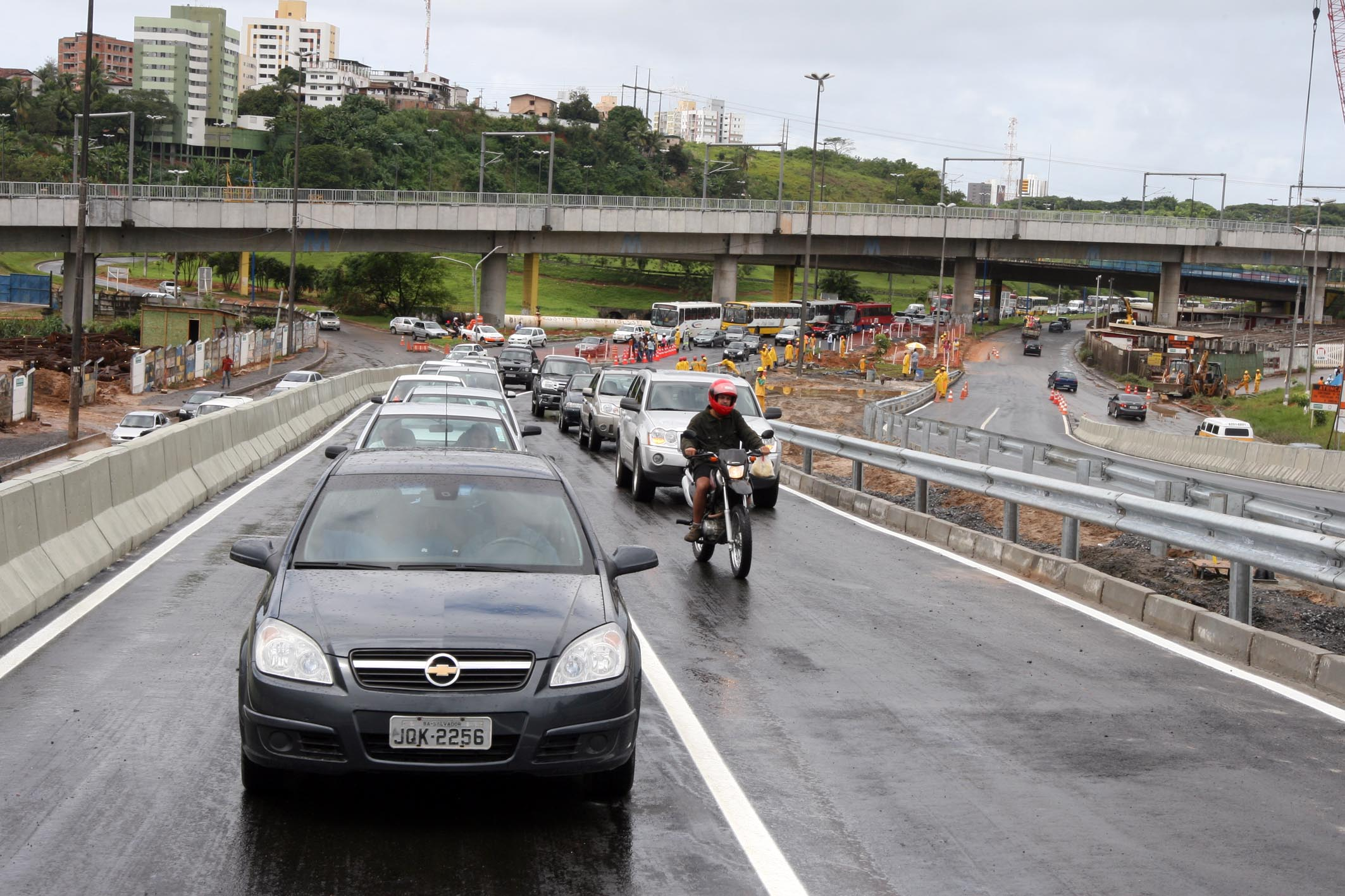 Entregues viadutos da Via Expressa Baía de Todos os Santos Os dois primeiros viadutos da Via Expressa Baia de Todos os Santos, que ligam o Retiro ao Iguatemi e o Iguatemi ao Retiro foram abertos neste fim de semana e devem receber em média 40 mil veículos por dia. São cerca de 340 metros de comprimento em cada sentido e 8,80 de largura com duas pistas de cada lado, o que vai facilitar o trânsito e acabar com os engarrafamentos no local. Na foto: Fotos: Vaner Casaes / AGECOM Data: 01/08/2010